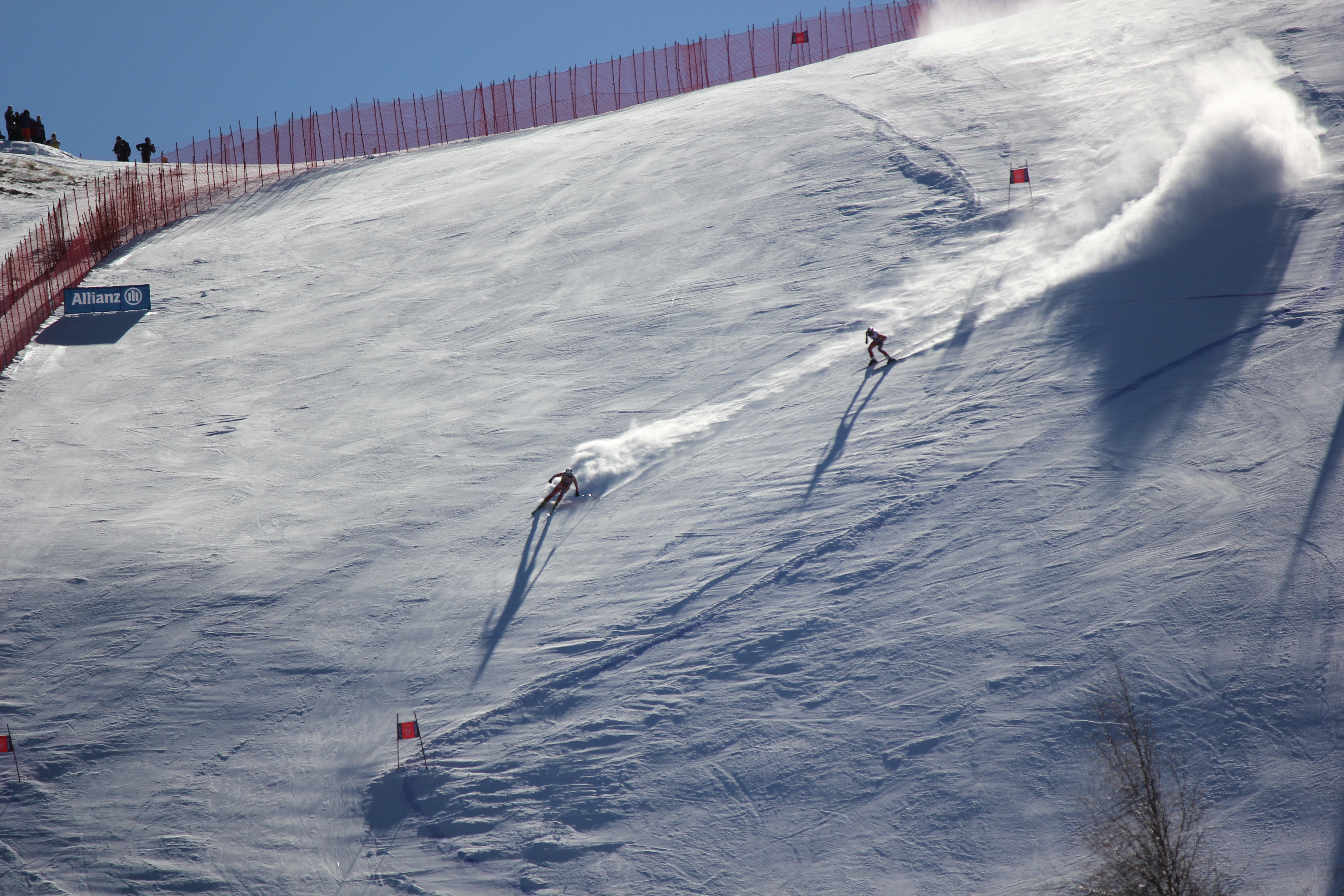 Gabriel Gorce y su guía Arnau Ferrer durante la prueba de descenso de los Campeonatos del Mundo 2013 IPC de La Molina, España.